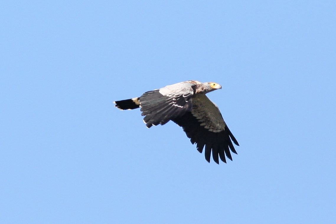 Madagascar Harrier-Hawk (Polyboroides radiatus), taken in Belo Tsiribihina, Toliara, Madagascar.